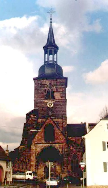 Stiftskirche Saarbrücken-St. Arnual